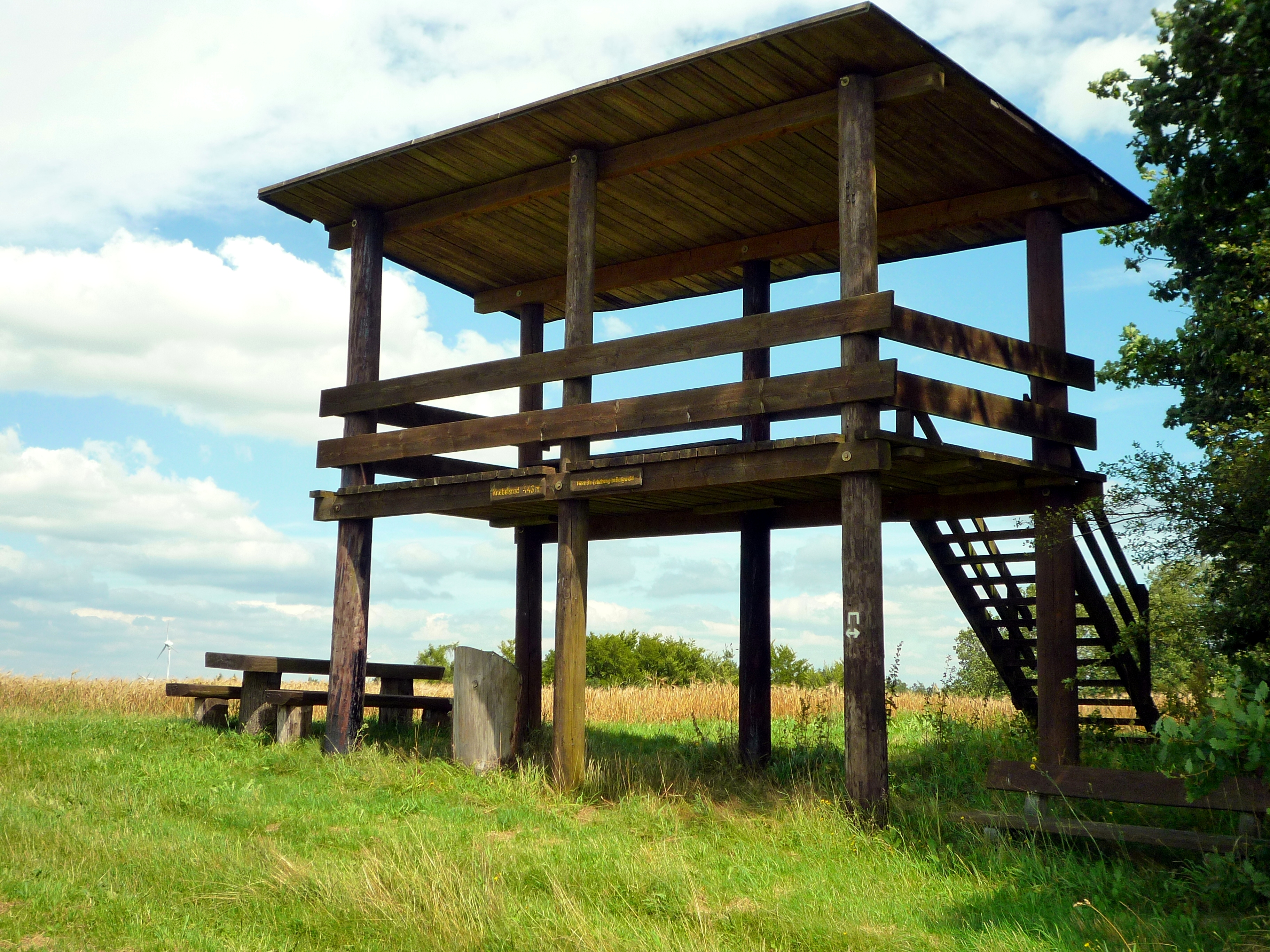 Aussichtsplattform am Knebelsrod